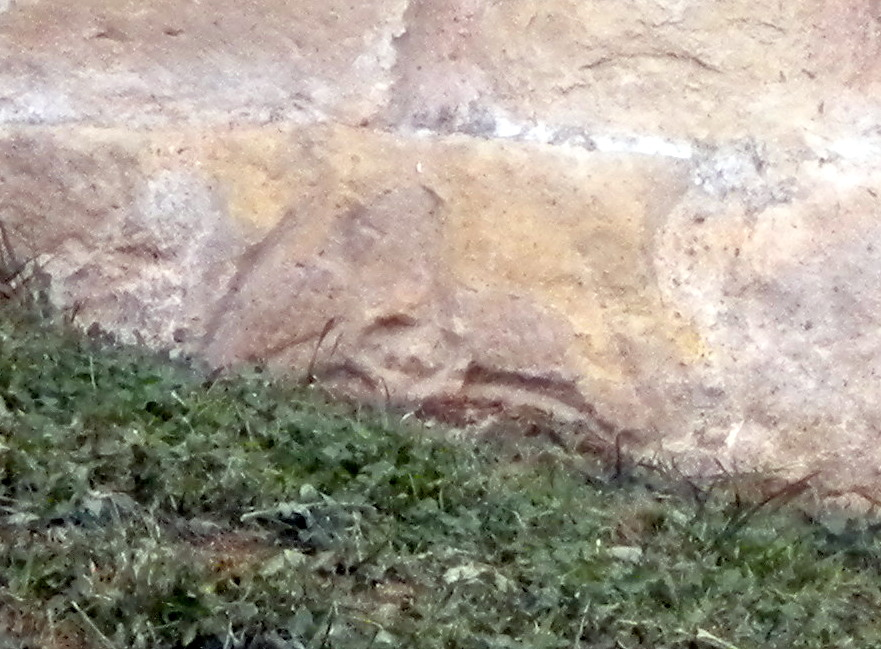 Dos palomas enfrentadas en relieve románico de la antigua iglesia de Santa María en los muros del Castillo de Miranda de Ebro (Castilla y León, España)